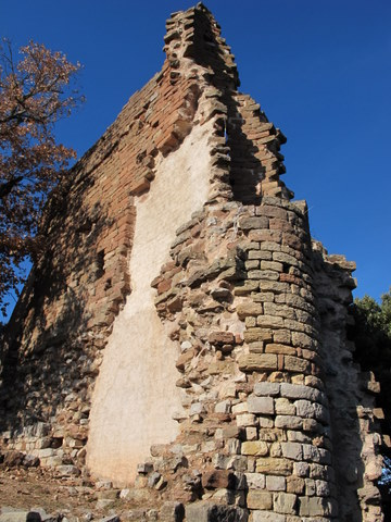 Restes del castell del Brull a la comarca d'Osona - Catalunya